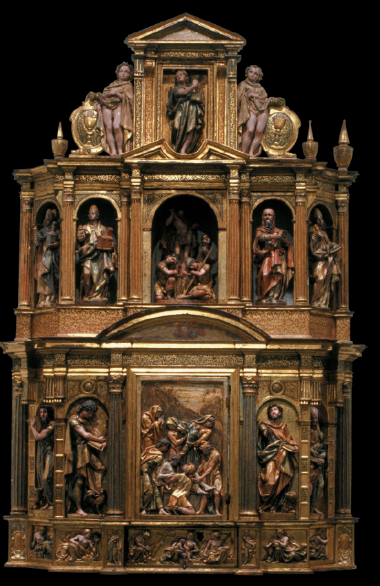 Anbrosio Bengoetxearen Alkizako Sagrarioa